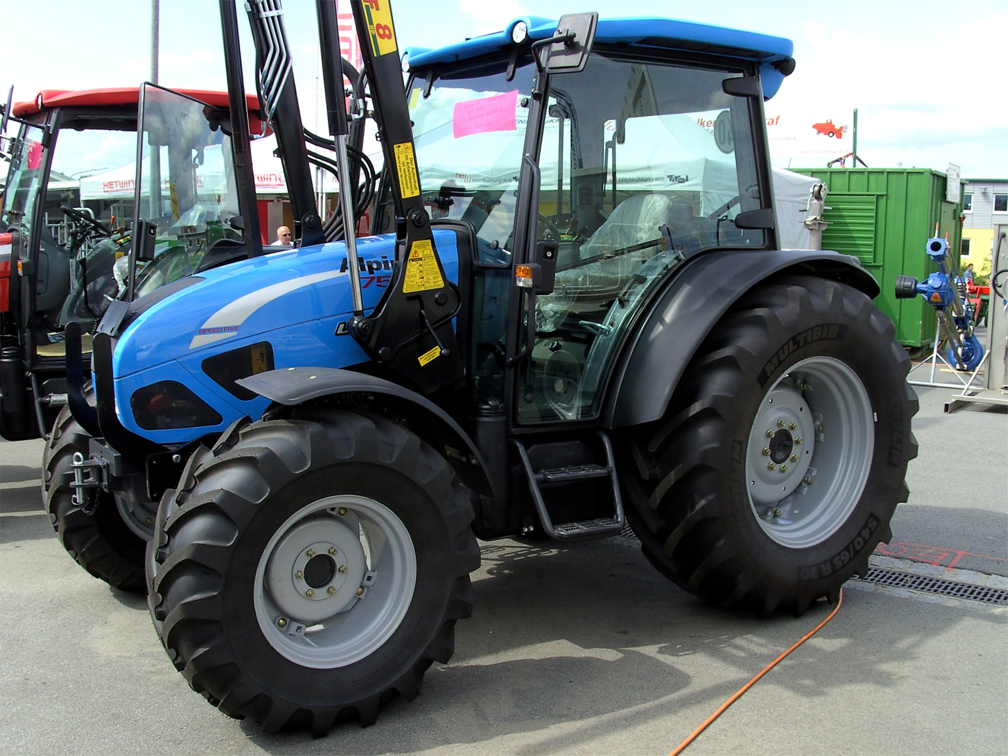 Landini Alpine 75 mit Stoll-Frontlader auf einer Ausstellung.